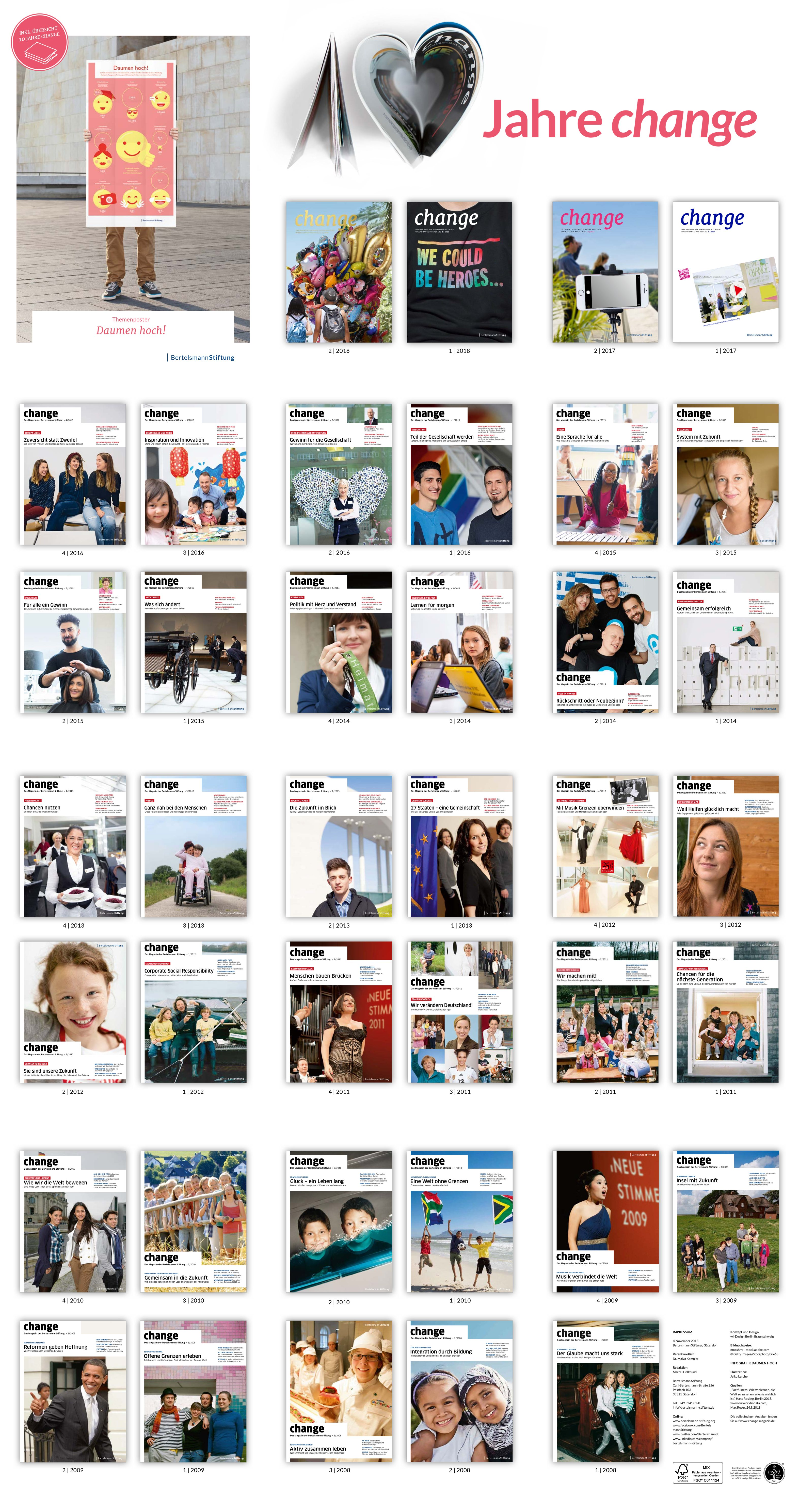 Übersicht aller Themen von Change in der Ausgabe 2/2018